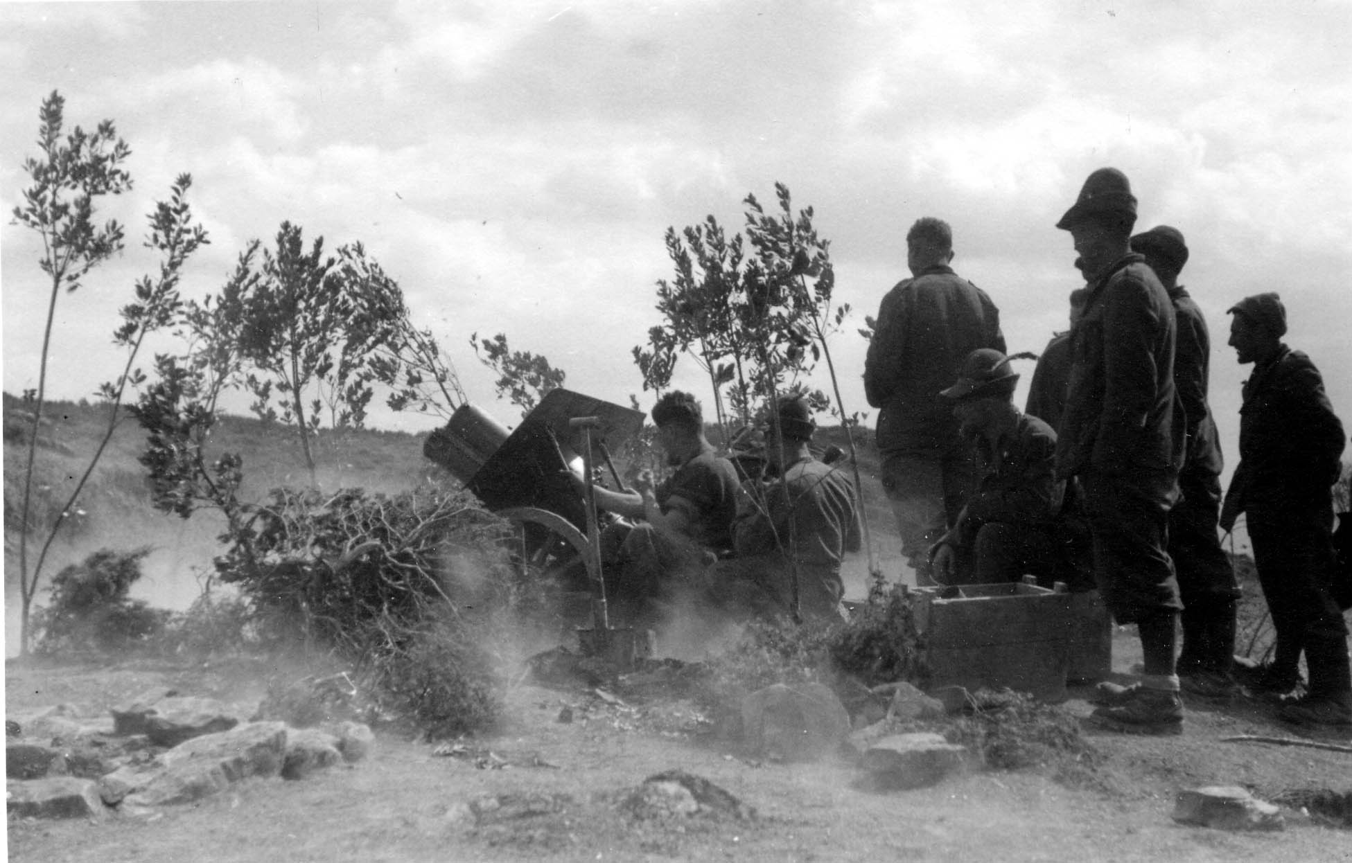 I pezzo da Bargullas. 1941